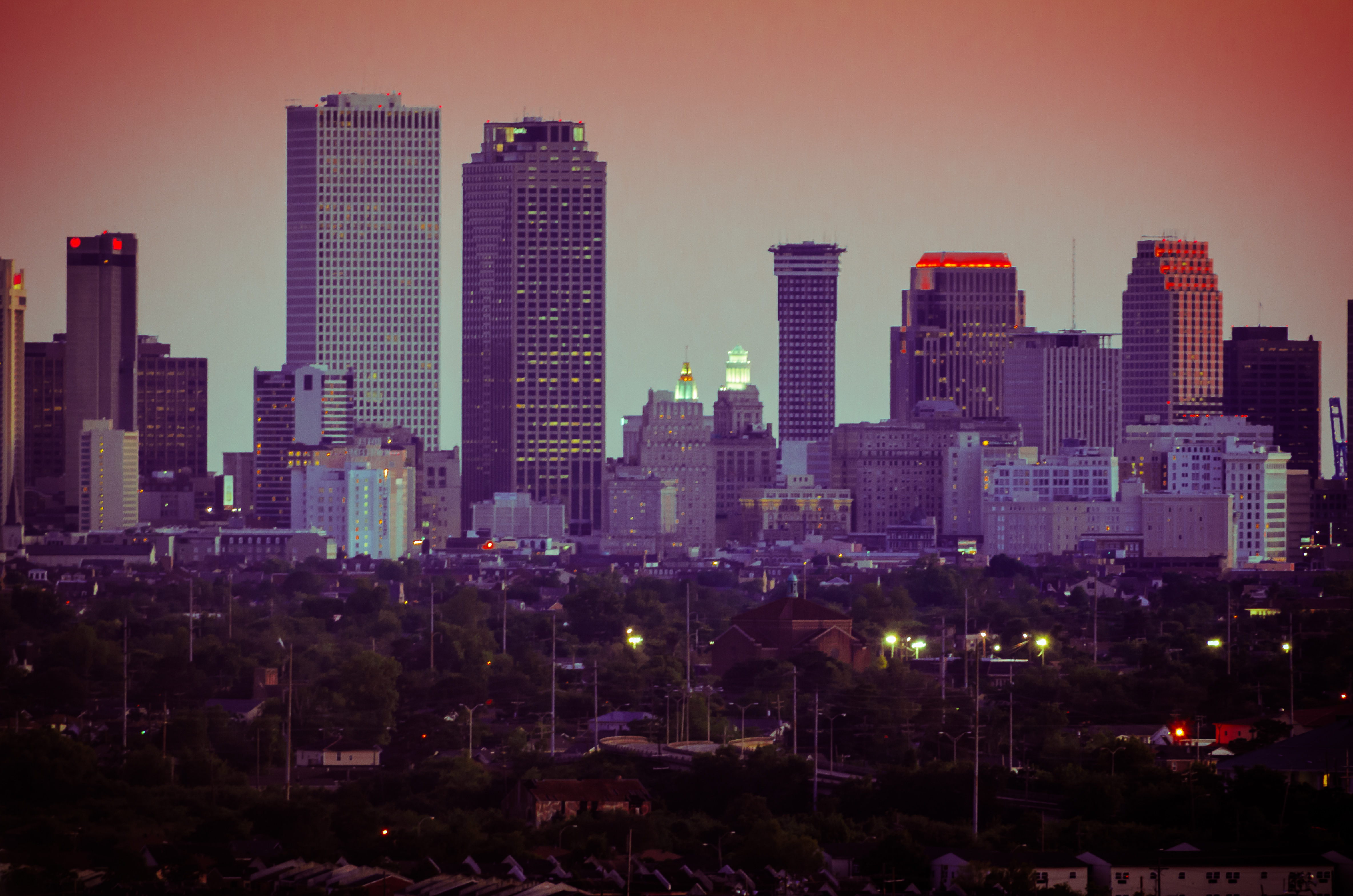 New Orleans skyline from Danziger Bridge